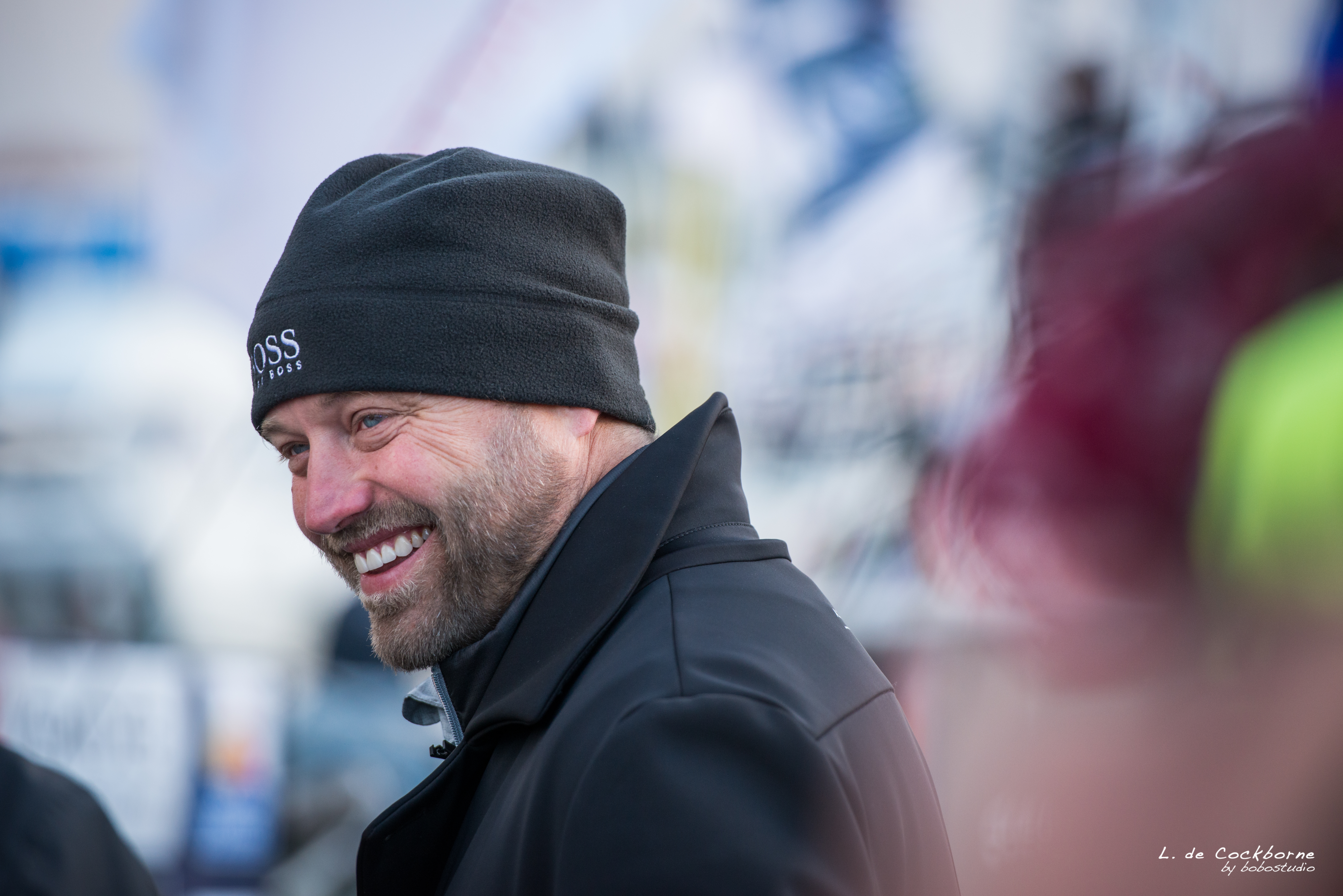 Reportage Vendée Globe 2016